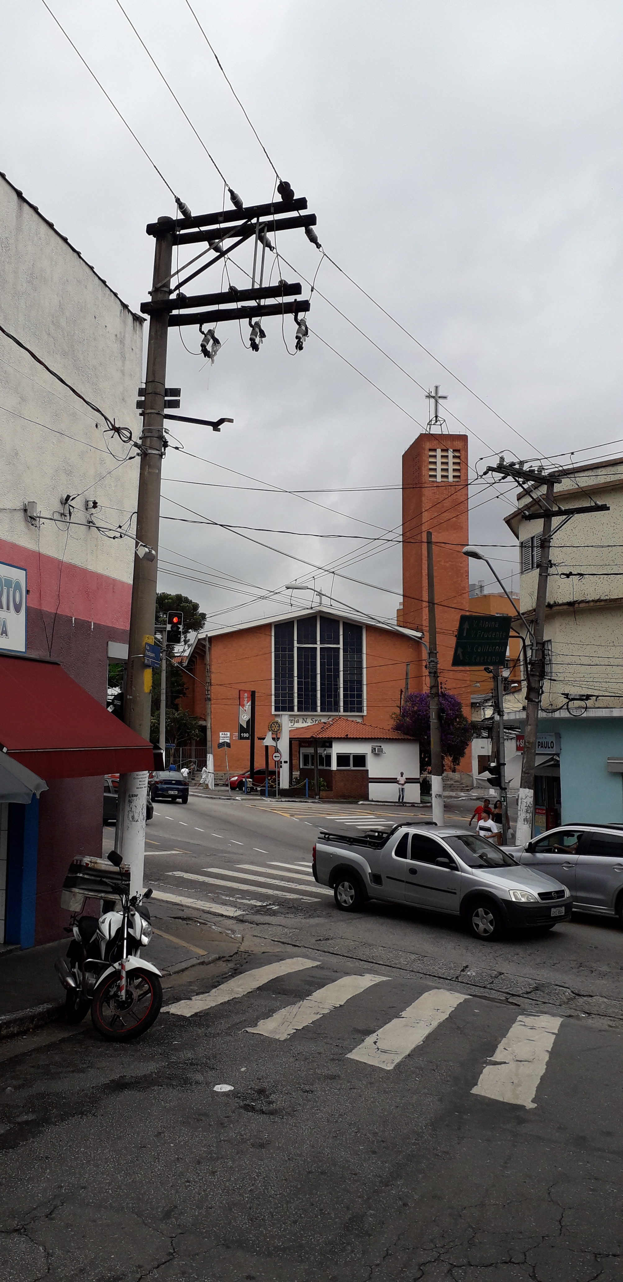 Igreja Nossa Senhora do Carmo no Largo de Vila Alpina